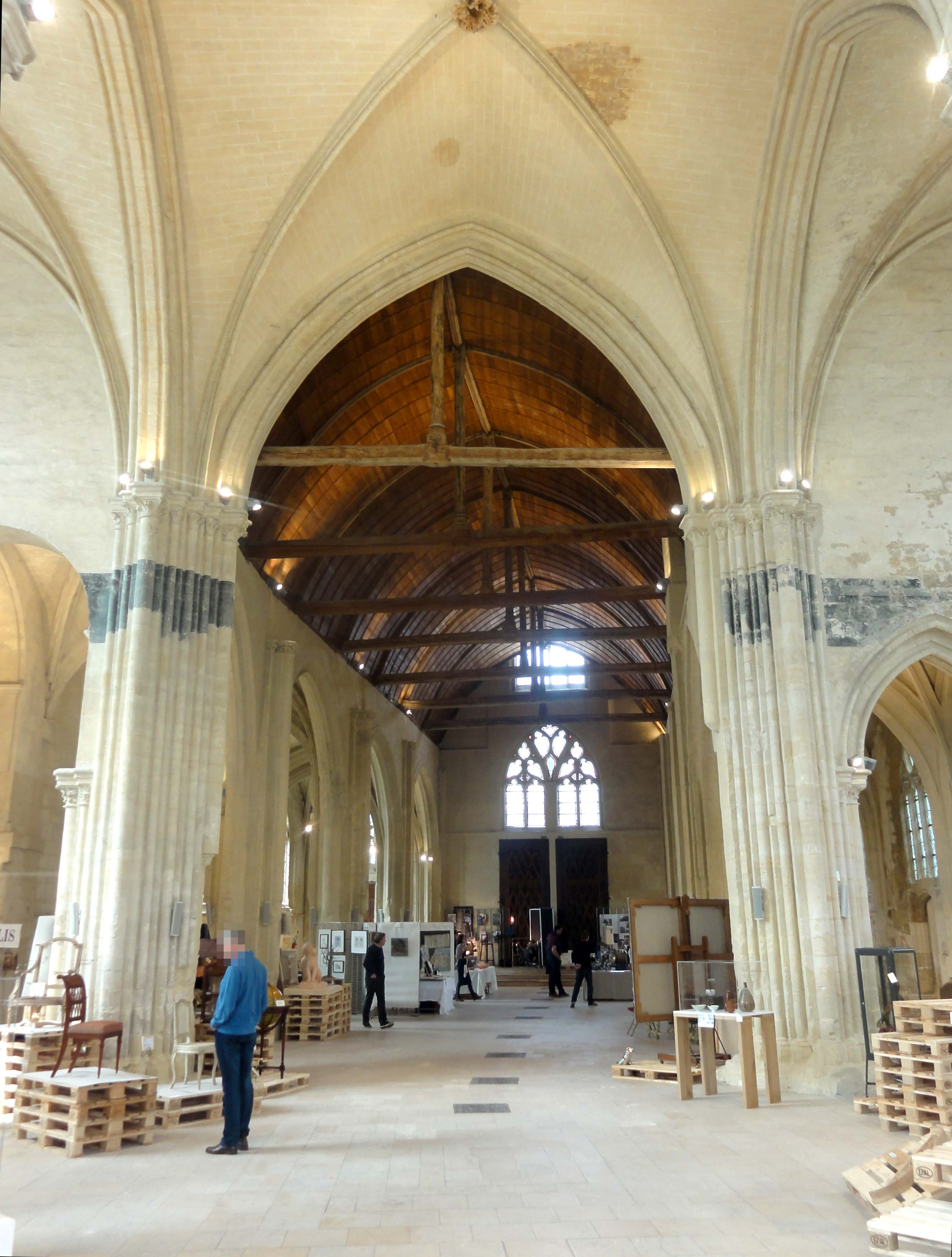 Intérieur de l'église - voir titre.